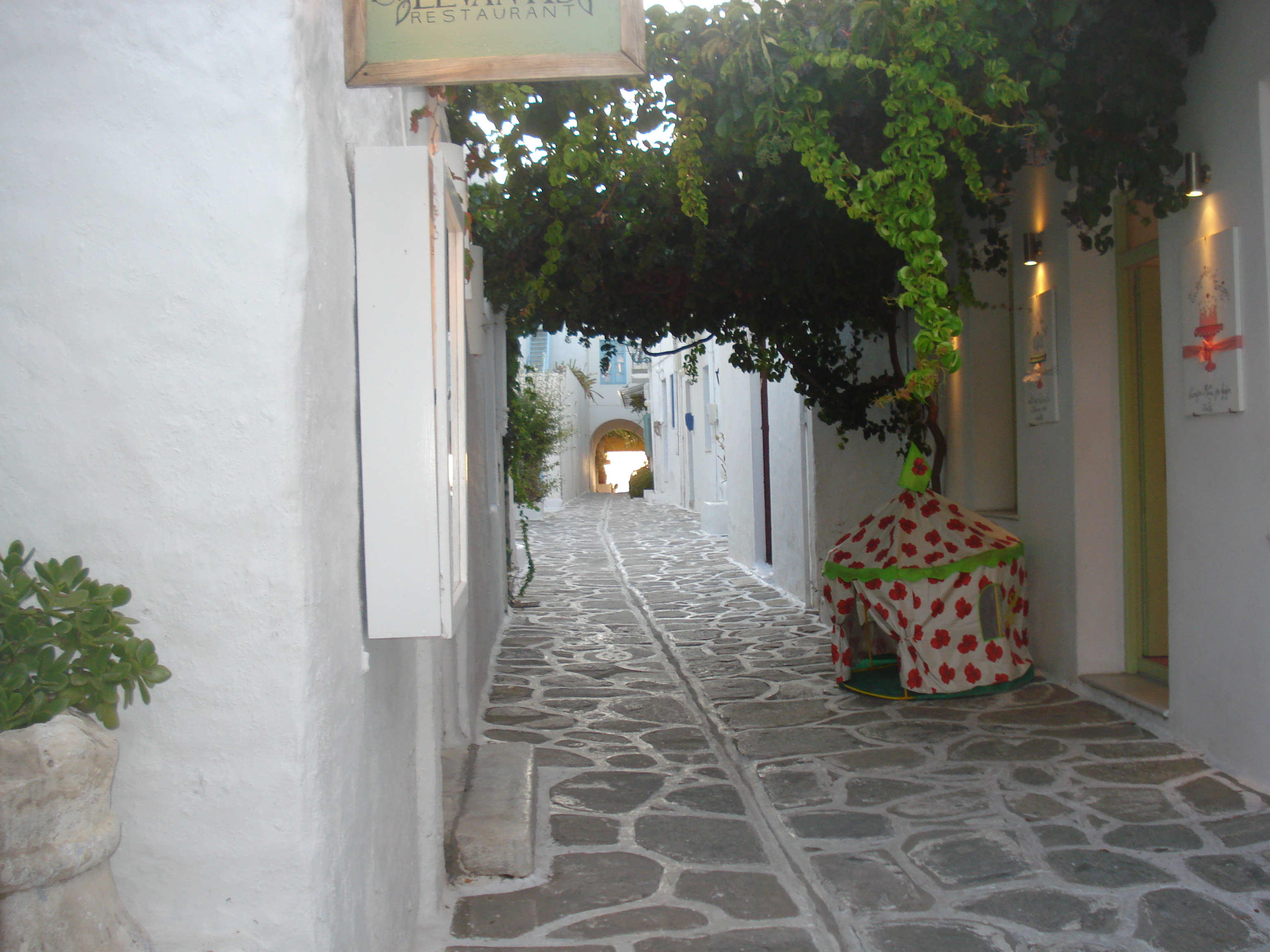 strada a Parikia